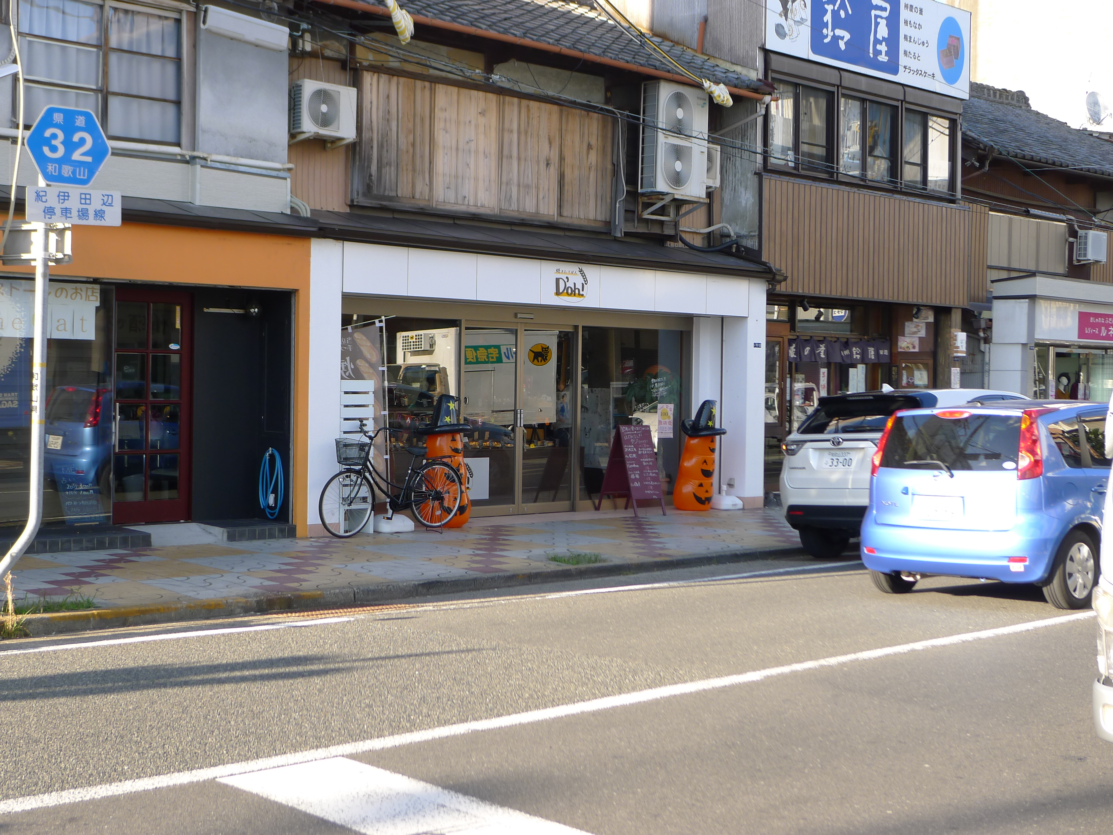 紀伊田辺駅からわずか200mしかない和歌山県道32号紀伊田辺停車場線の終点となる湊交差点